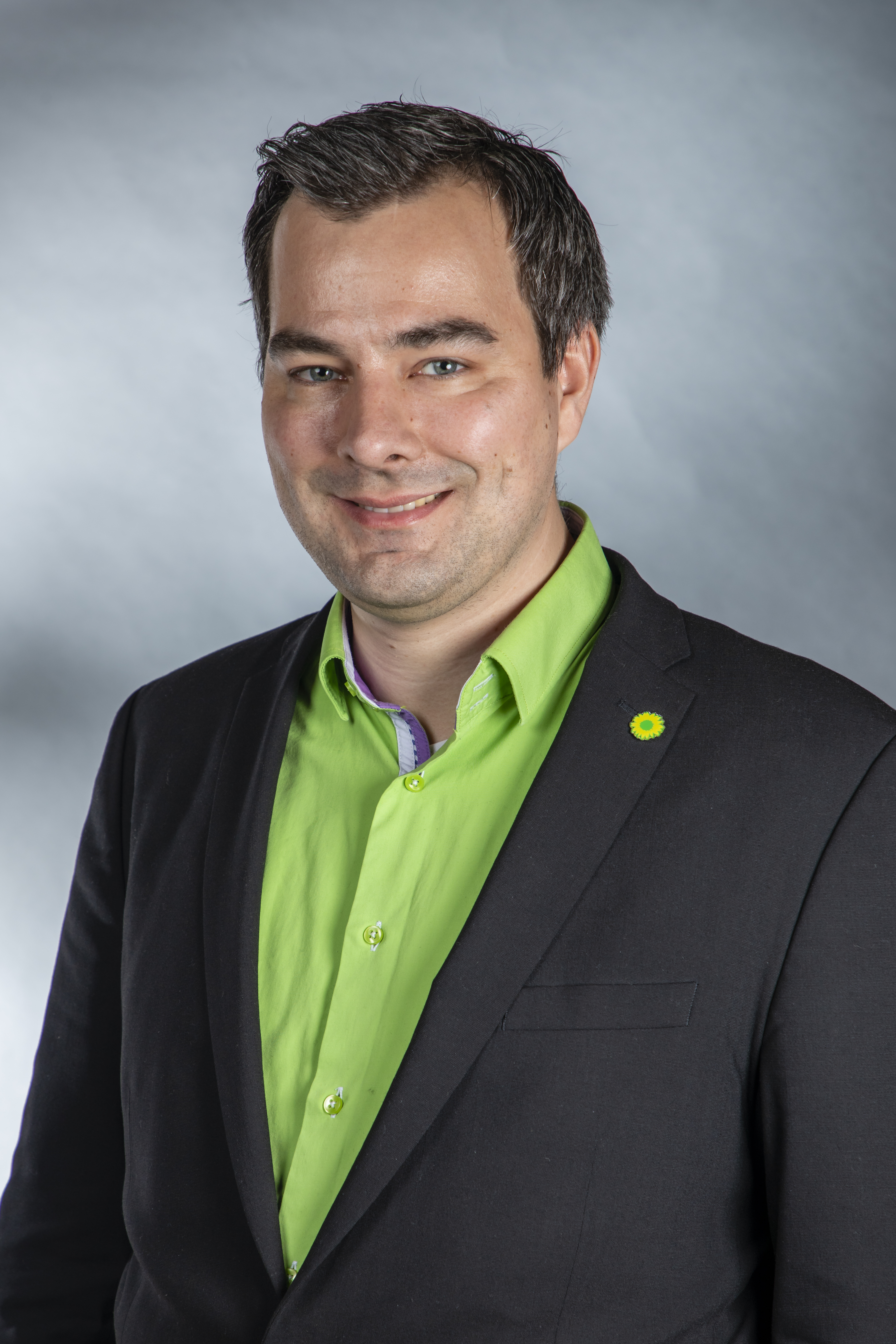 Maurice Müller